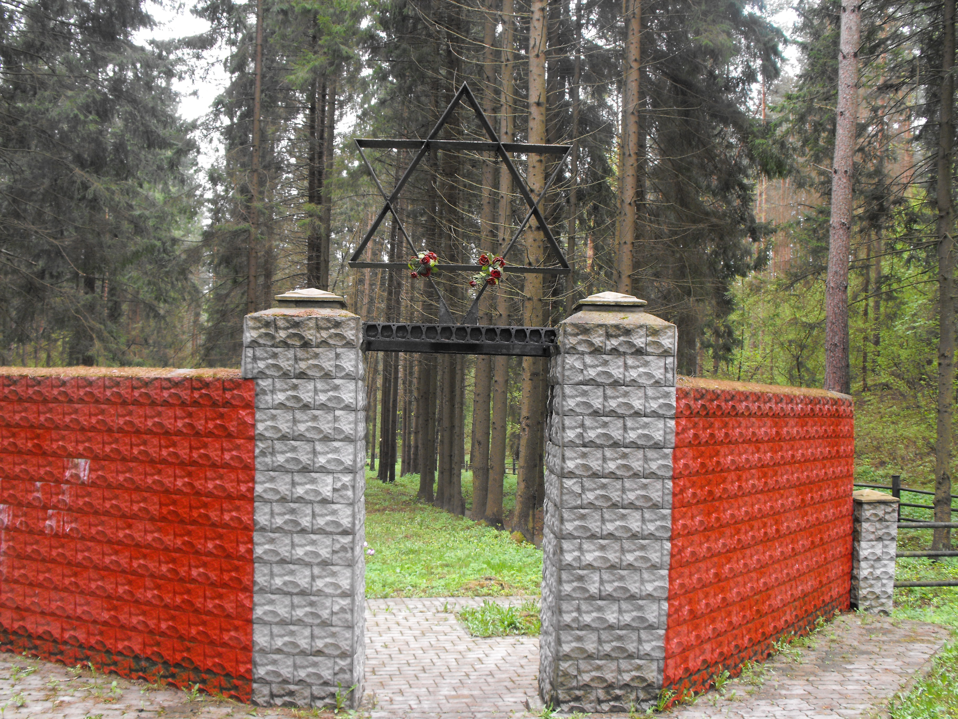 Мемориал на месте убийства нацистами узников Борисовского гетто. Находится в Борисове на обочине улицы Лопатина - примерно напротив через дорогу от инфекционной больницы (улица Лопатина, 172).